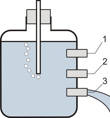 Сосуд Мариотта, при помощи которого можно добиться равномерного вытекания жидкости.